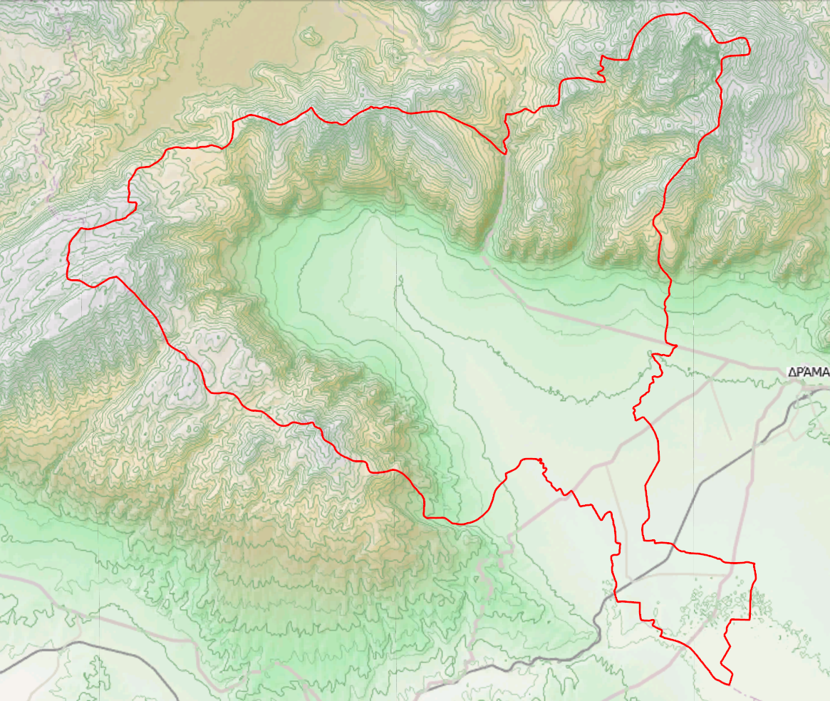 Τοπογραφικός χάρτης του Δήμου Προσοτσάνης (2011)